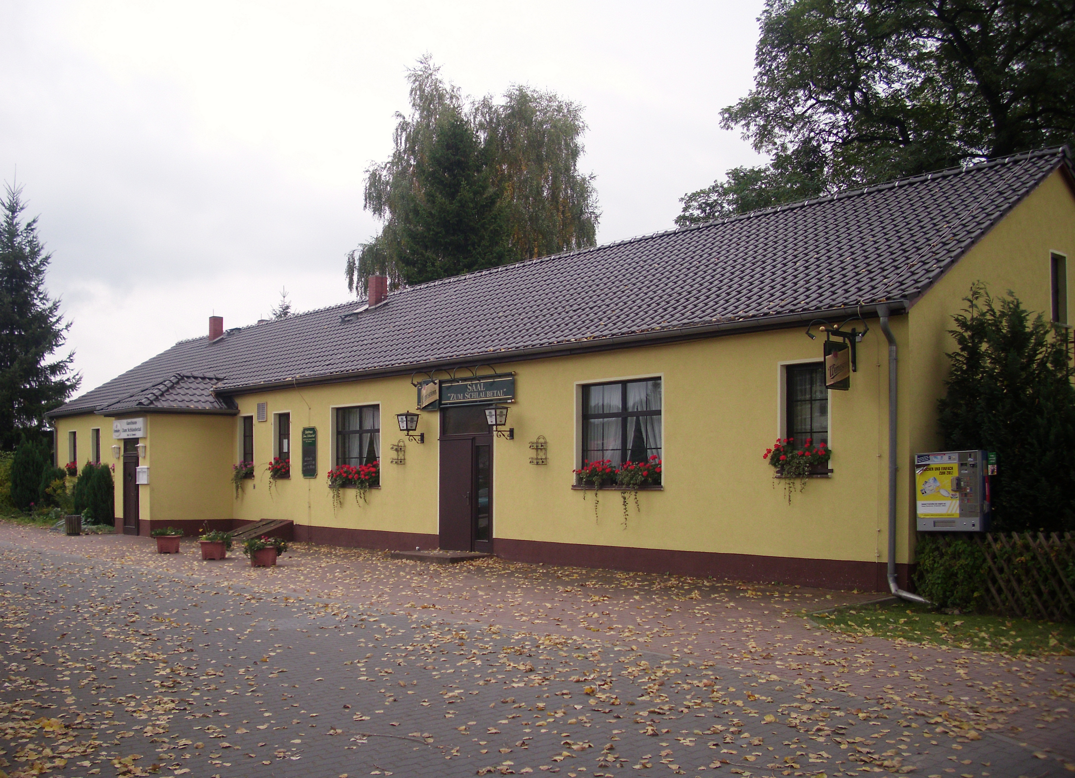 Gaststätte in Schernsdorf, Siehdichum, Brandenburg